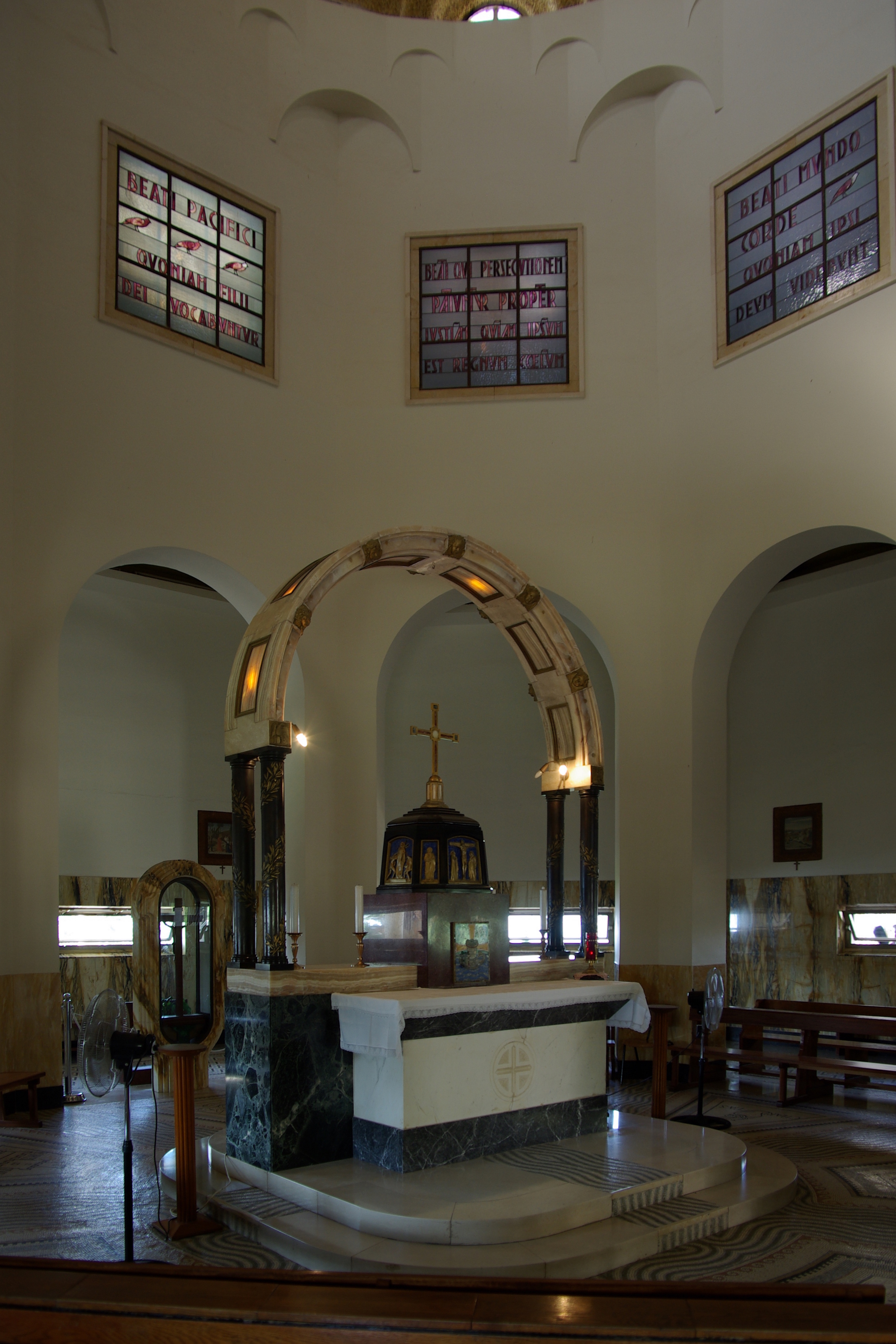 Kirche auf dem Berg der Seligpreisungen